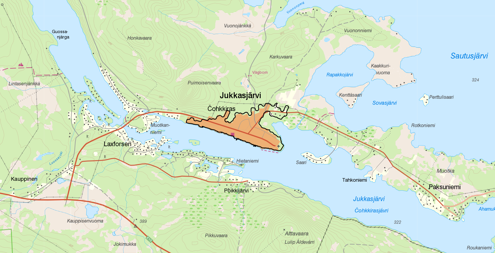 Tätorten Jukkasjärvi med gränserna från Statistiska centralbyråns tätortsavgränsning 2015. Bakgrundskarta från Lantmäteriet, skala 1:30 236.